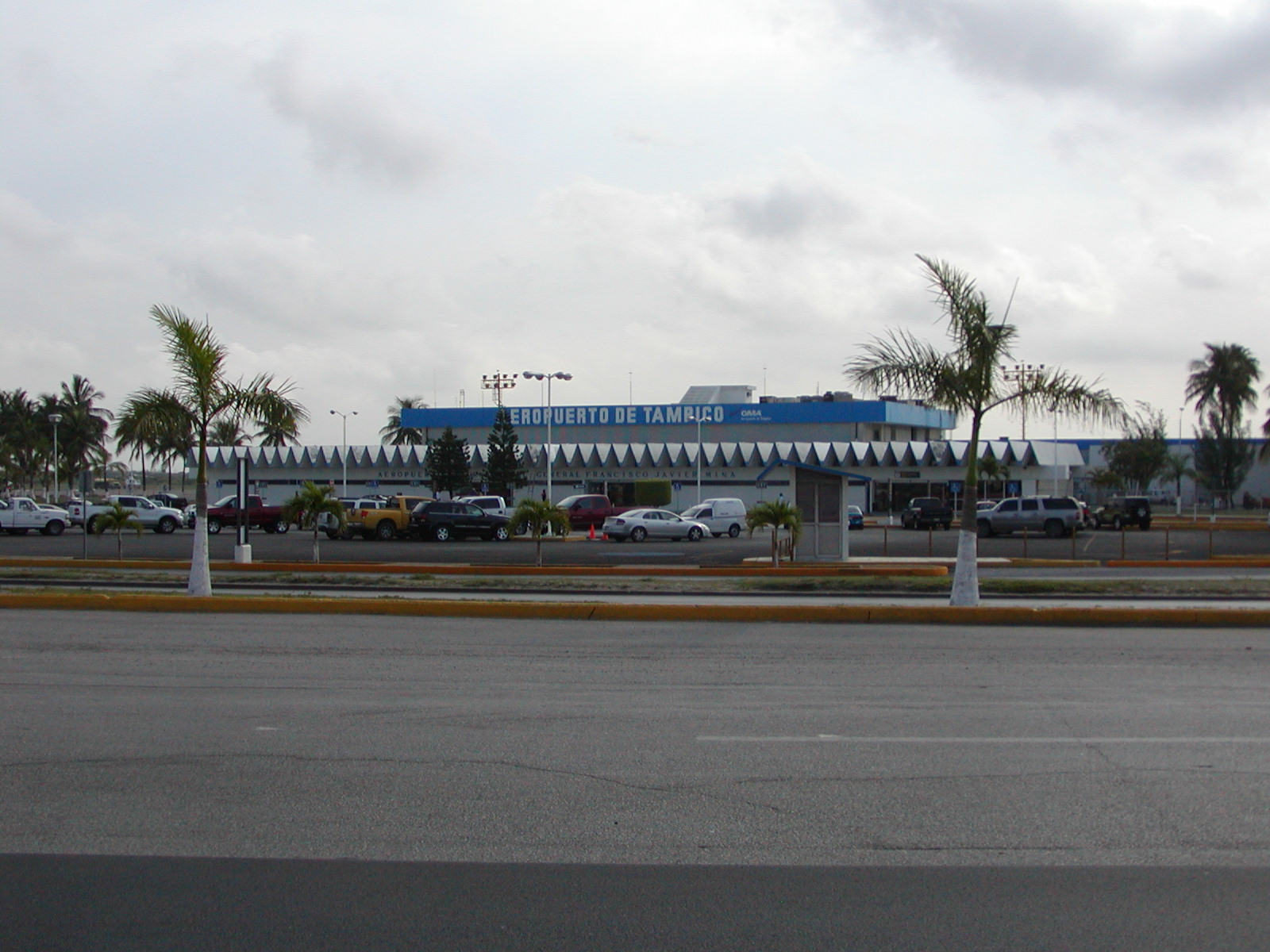 Aeropuerto internacional Javier Mina